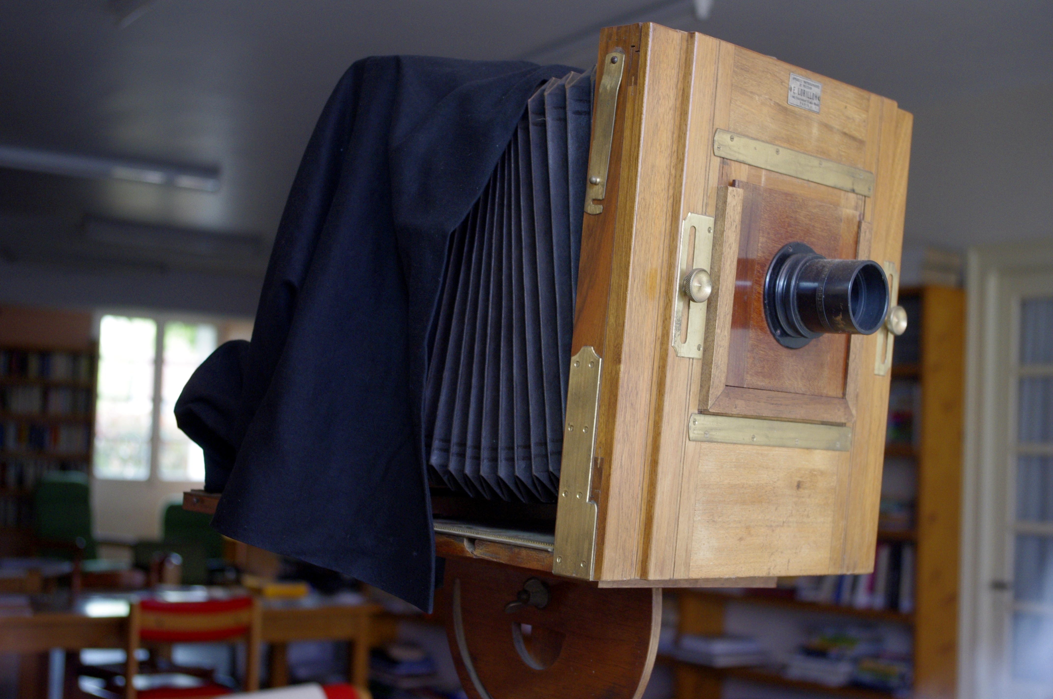 Félibrée à Piégut-Pluviers 2012 - anciennes appareils photo exposées dans la bibliothèque municipale. Étiquette: Appareils photographiques de précision E. Lorillon, 7 Imp Franchemont, R Jean-Macel, Paris